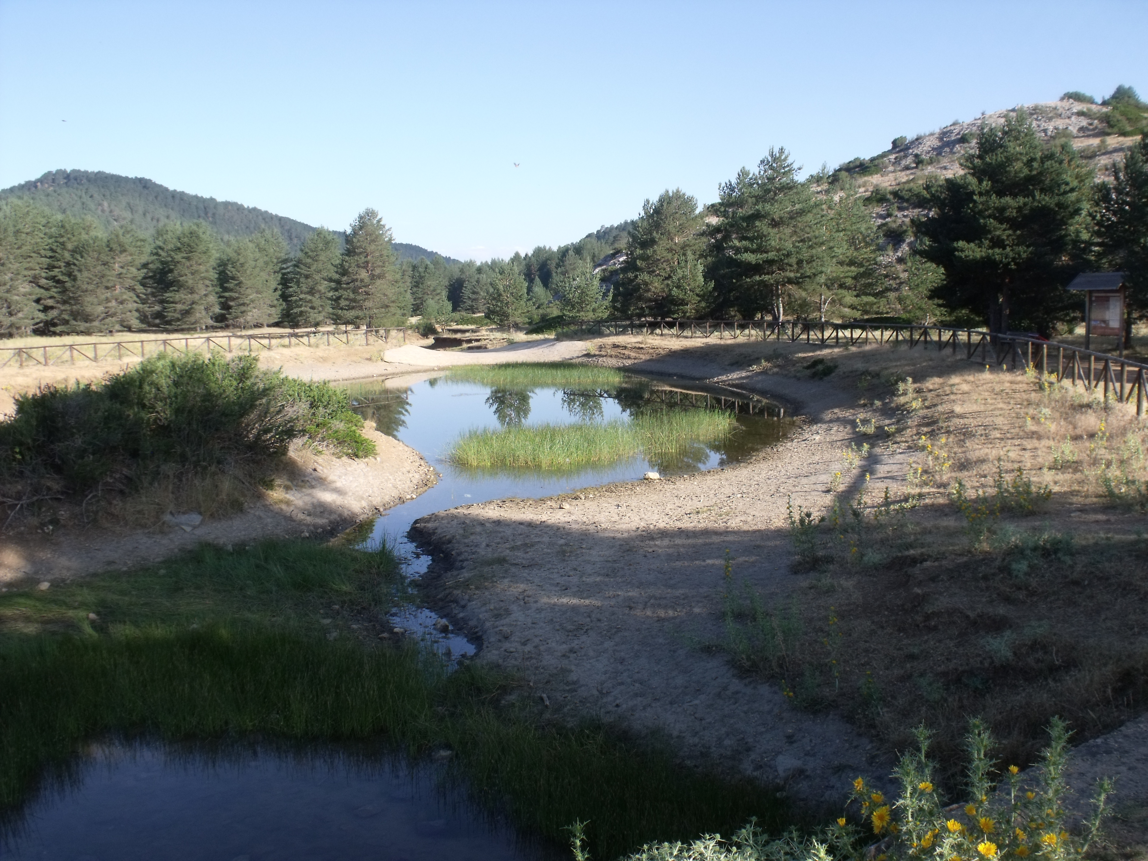 nacimiento del río